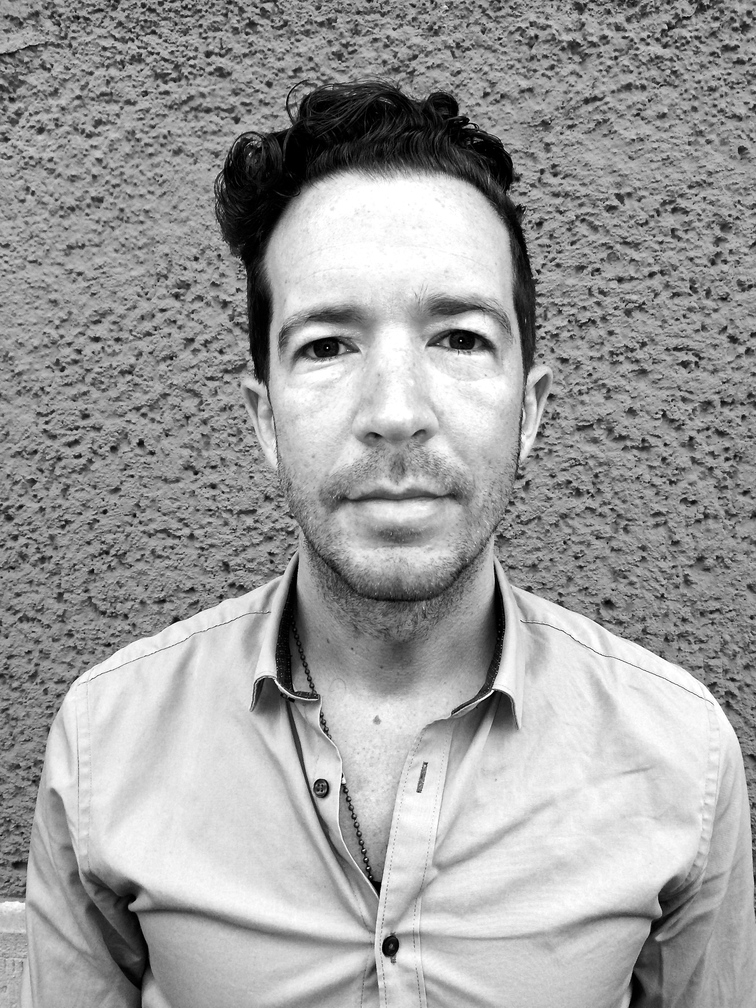 Portrait Alexander Kleider